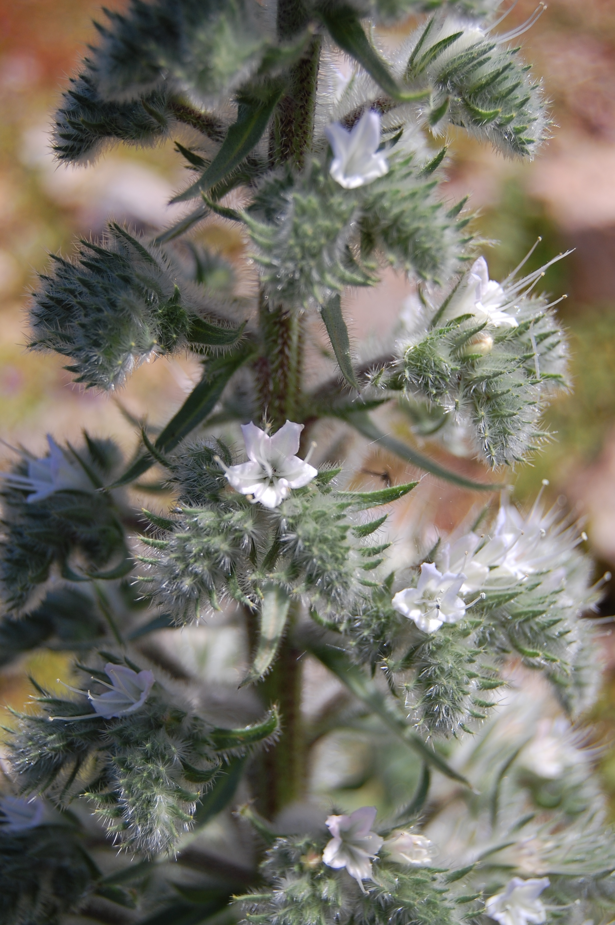 Echium italicum subsp. siculum Riserva naturale Monte Pellegrino, Palermo